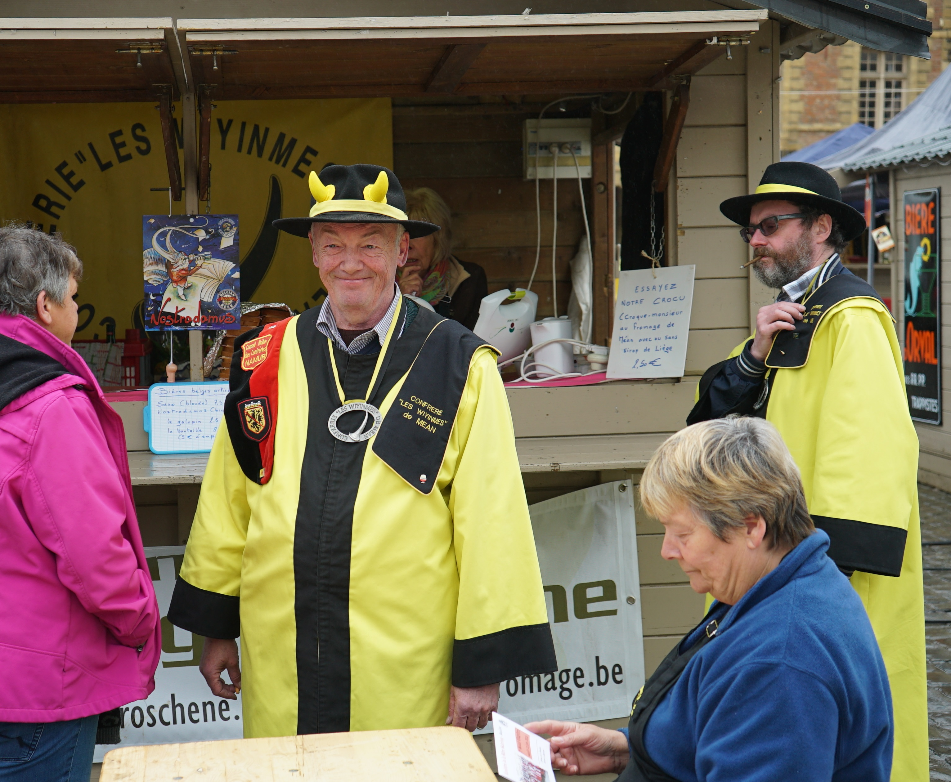 lors des Fêtes des confréries de Charleville.